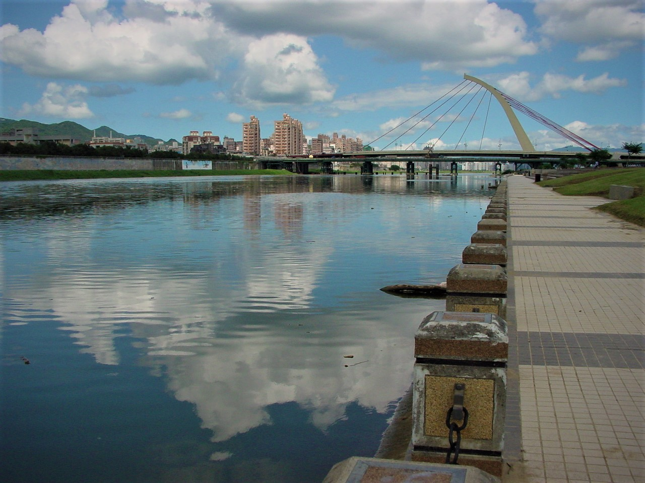 中文（台灣）: 台北大佳河濱風景如畫